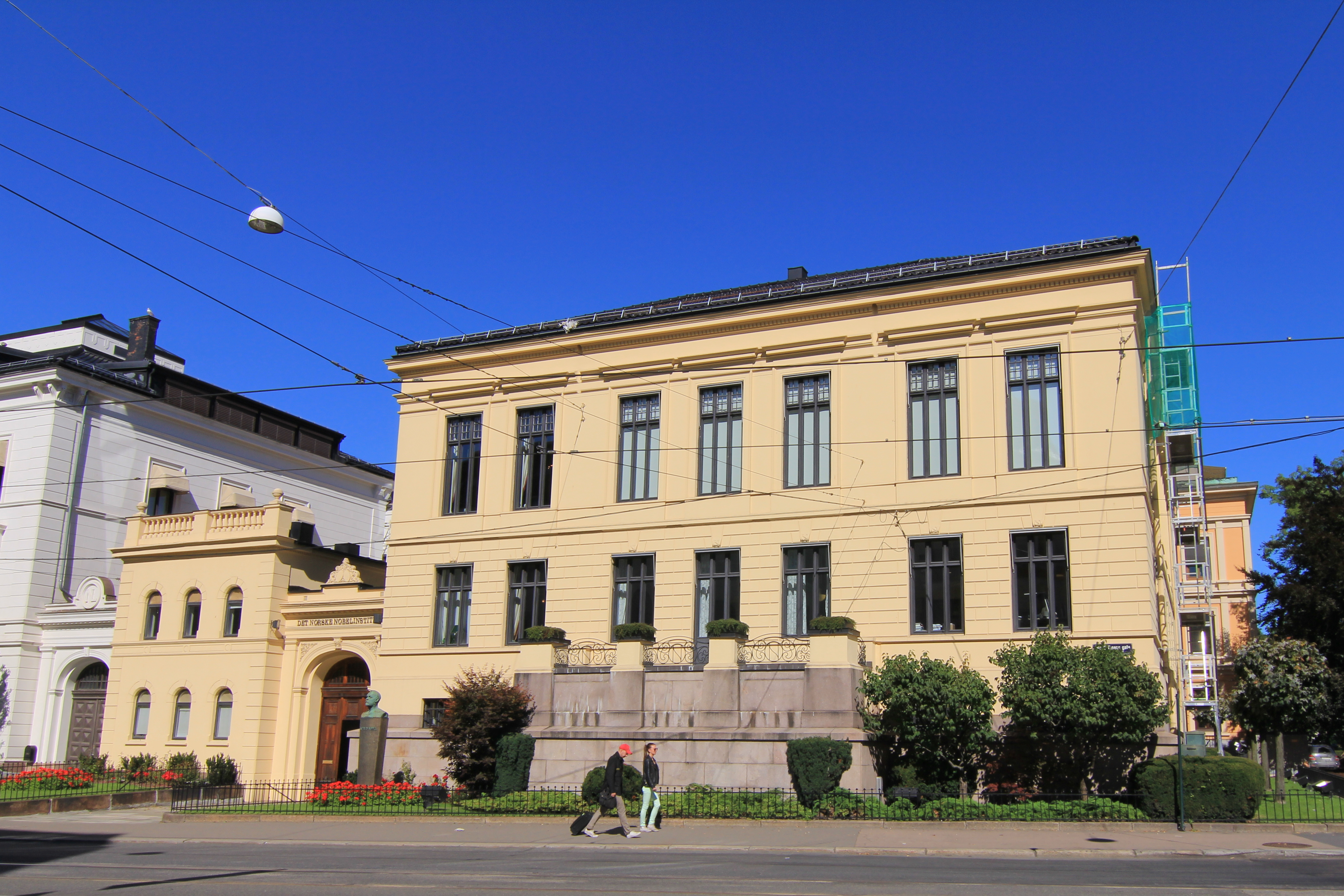 The Norwegian Nobel institute, Oslo, Norway in 2012.